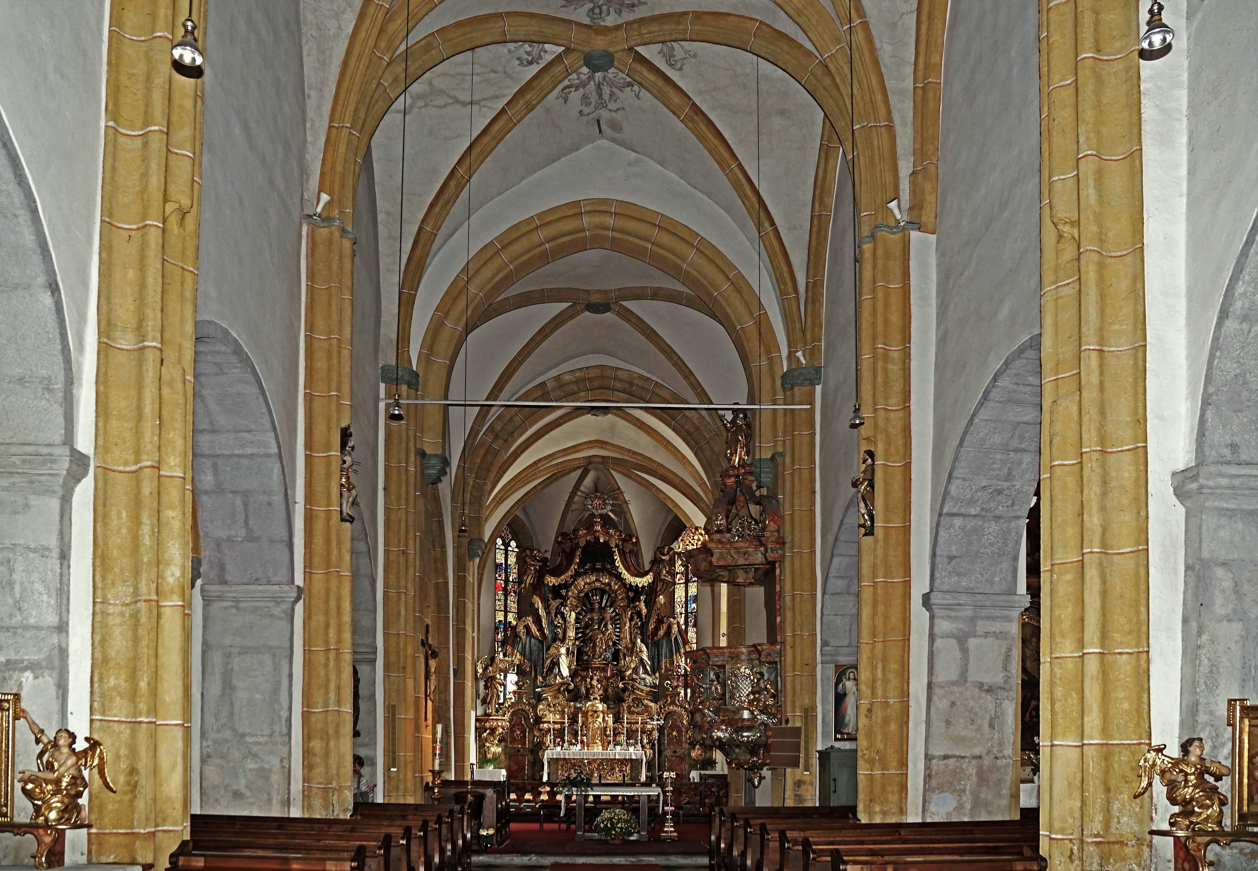 Kath. Pfarrkirche Hl. Dreifaltigkeit St. Veit an der Glan, Innenansicht